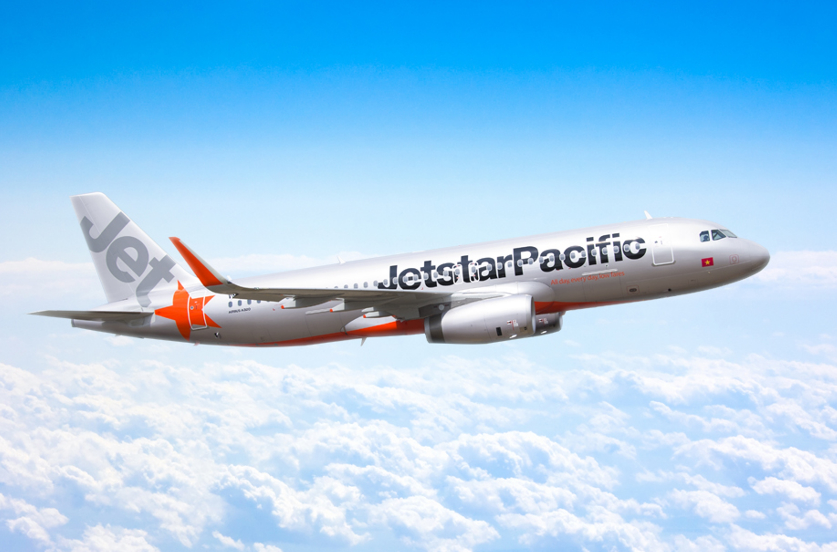 Máy bay Airbus A320 Sharklet của Jetstar Pacific